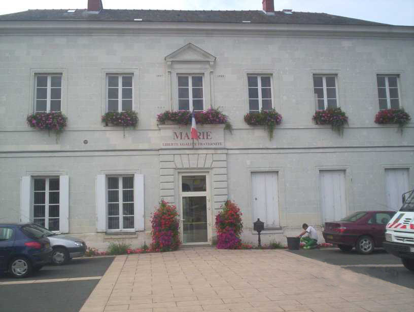 mairie de la commune de corné (49) maine & loire